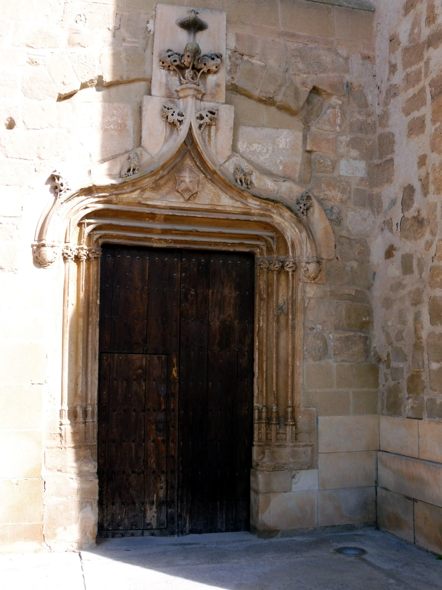 Antiga església de Sant Joan (Térmens): portal